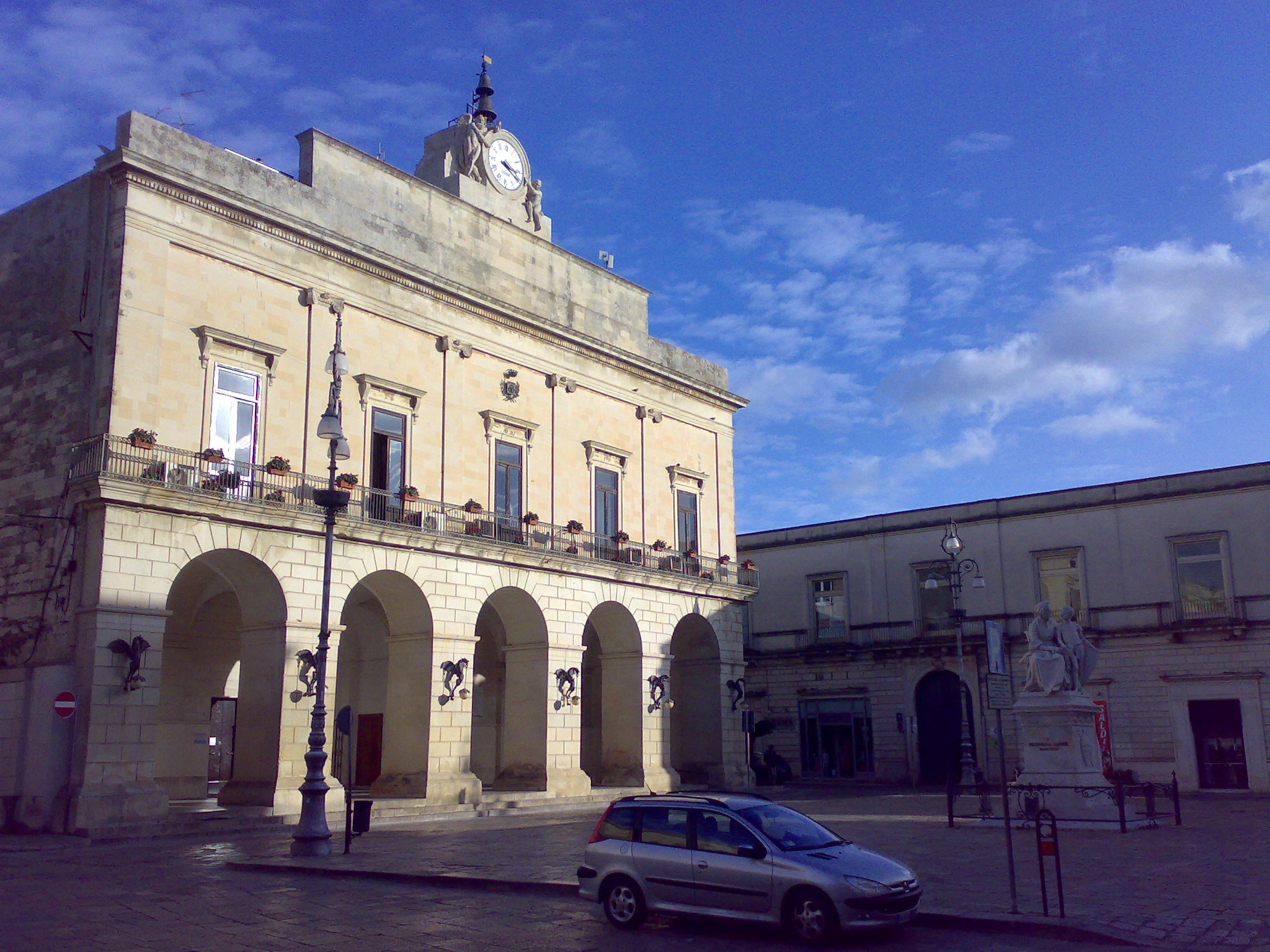 Piazza Aldo Moro Maglie, provincia di Lecce